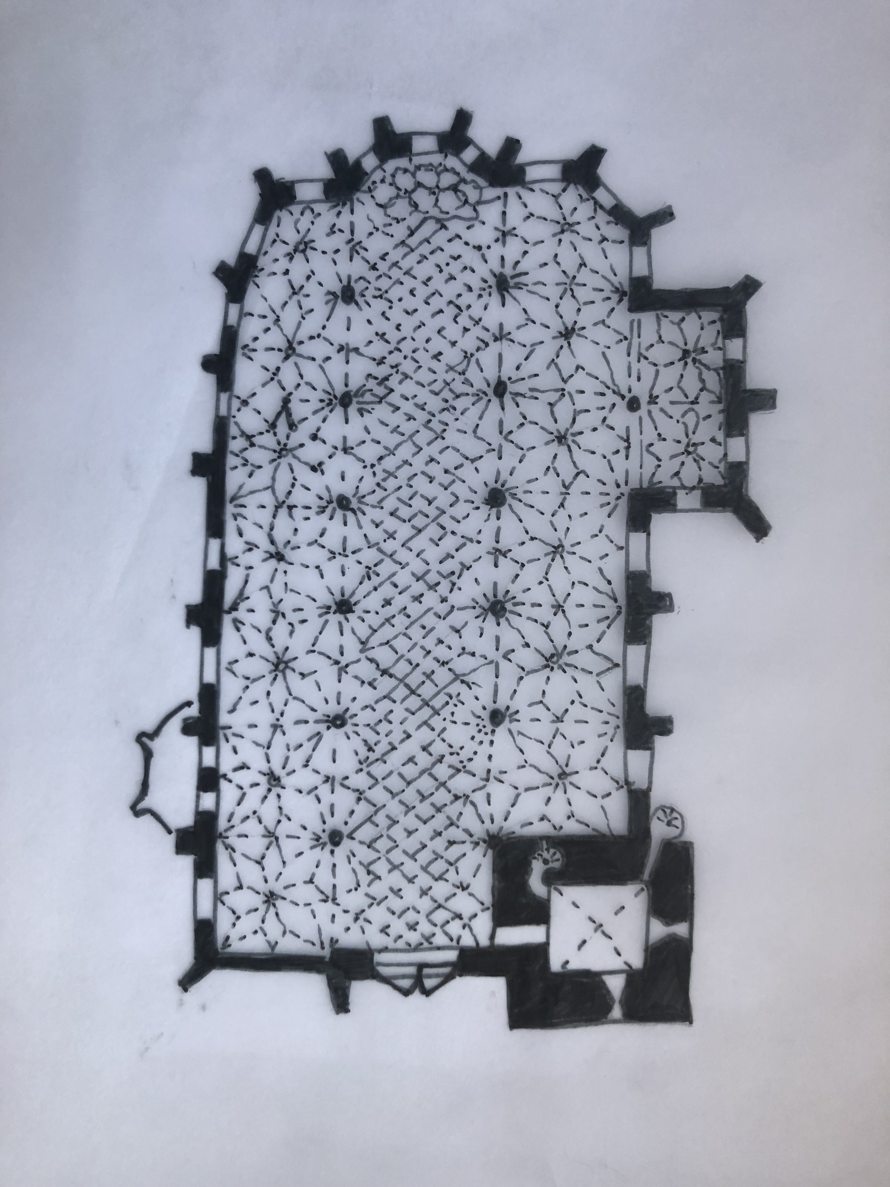 půdorys